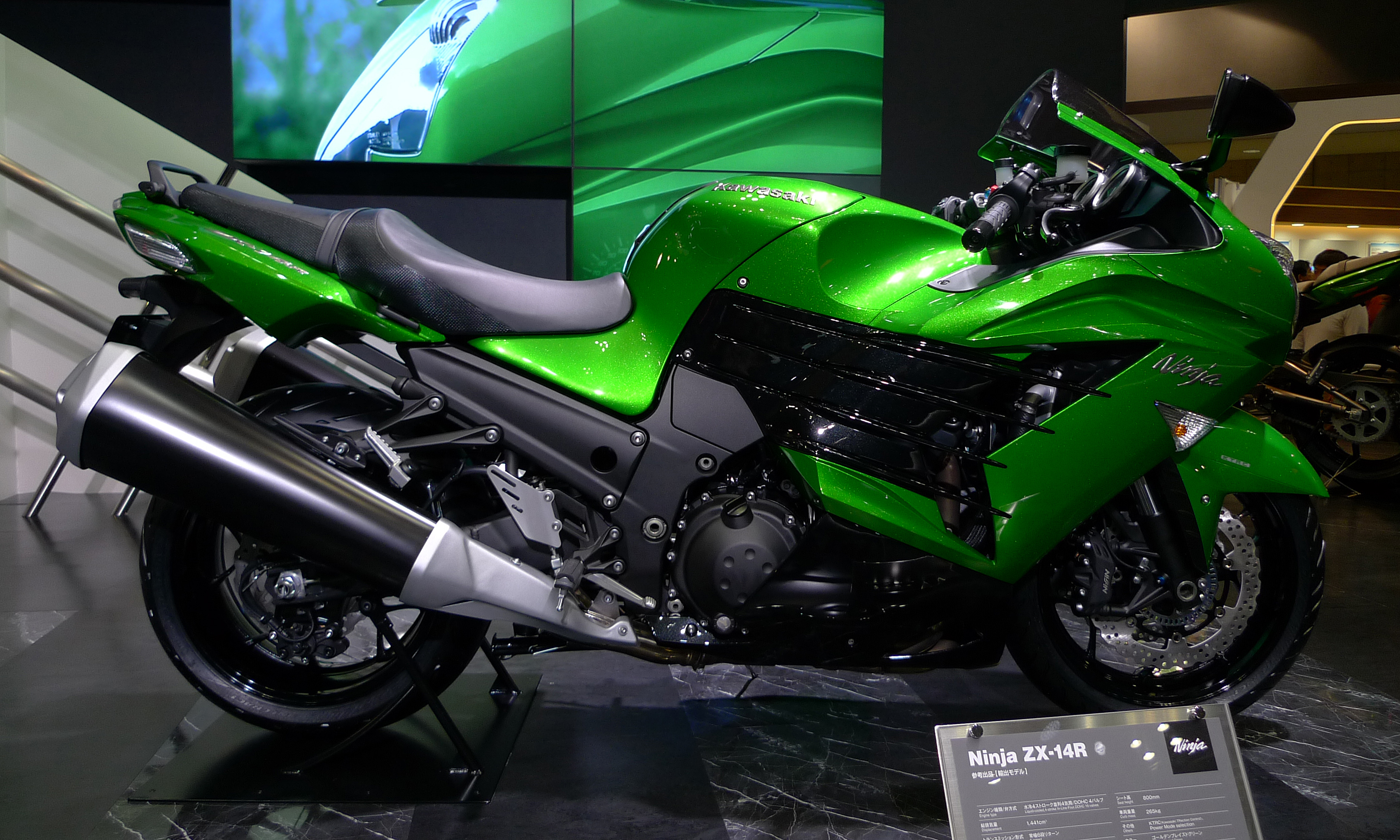 カワサキ・Ninja ZX-14R 2012 東京モーターショー2011にて撮影